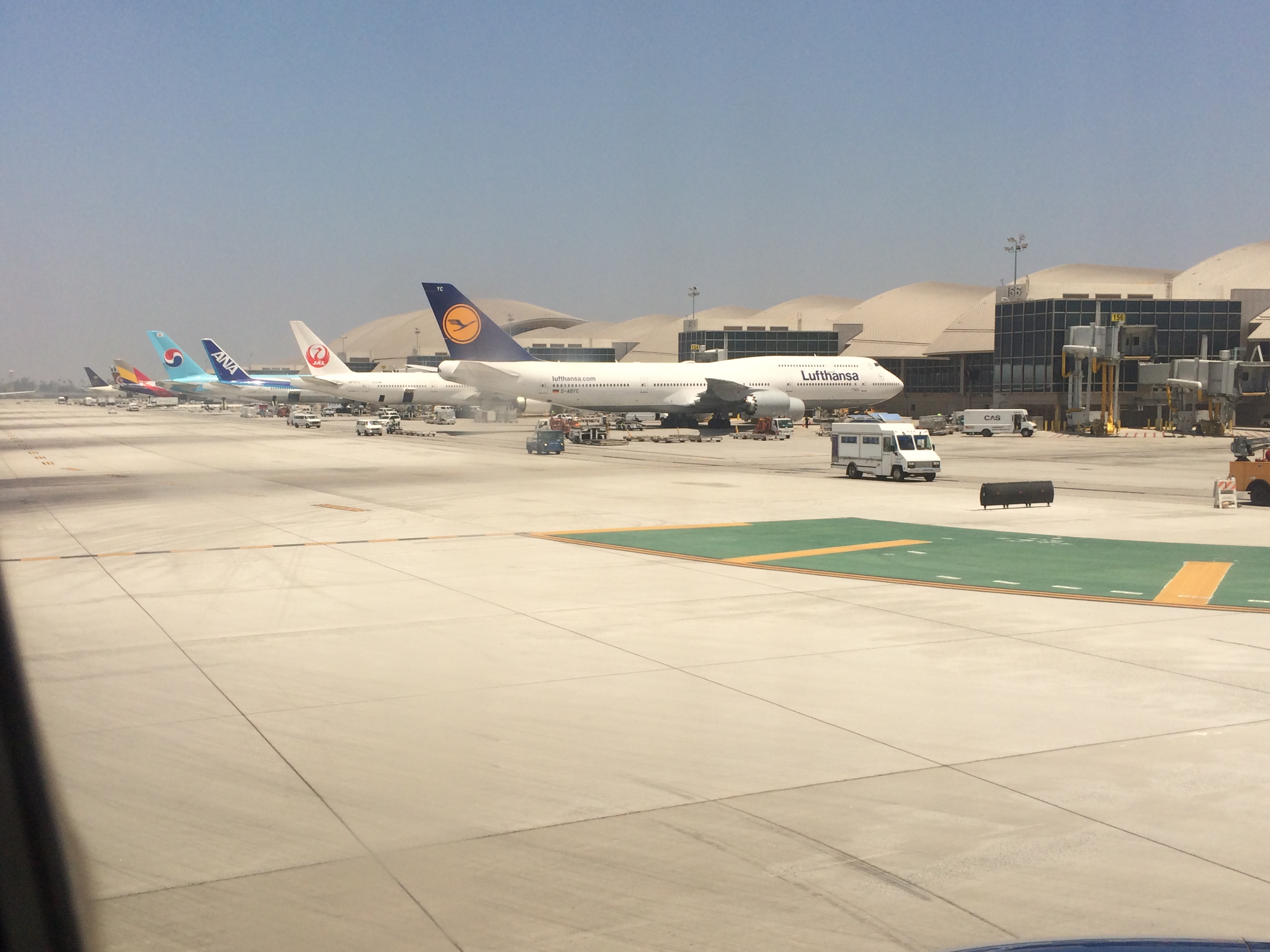 Terminal Tom Bradley en Los Ángeles